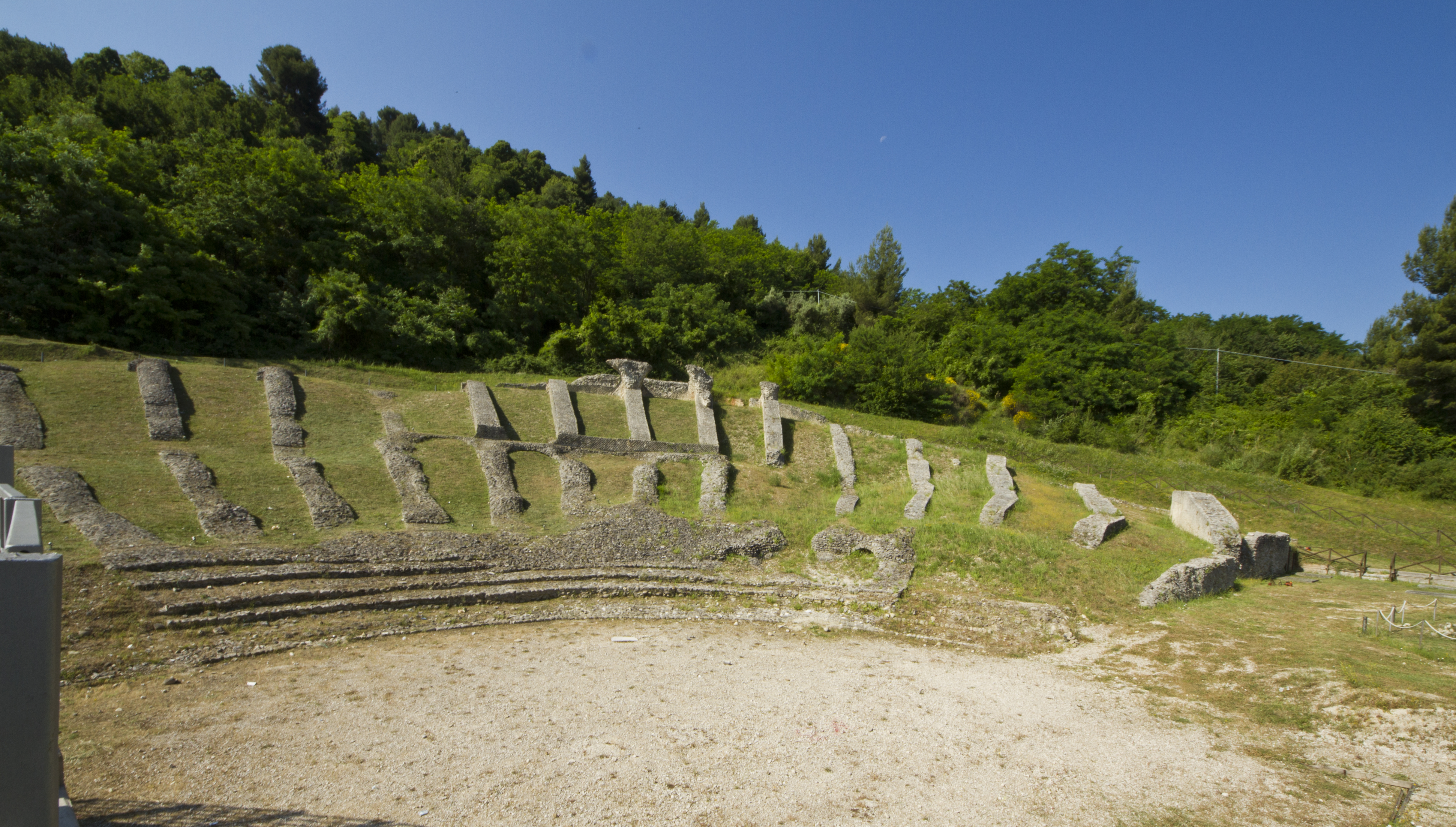 centro storico, 63100 Ascoli Piceno AP, Italy